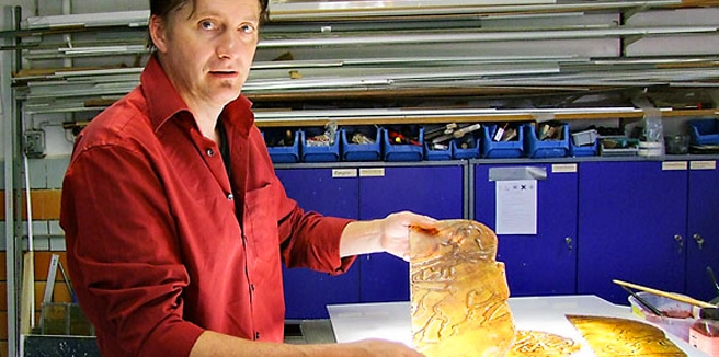 Glaskünstler Wolfgang Nickel bei der Arbeit in seinem Atelier